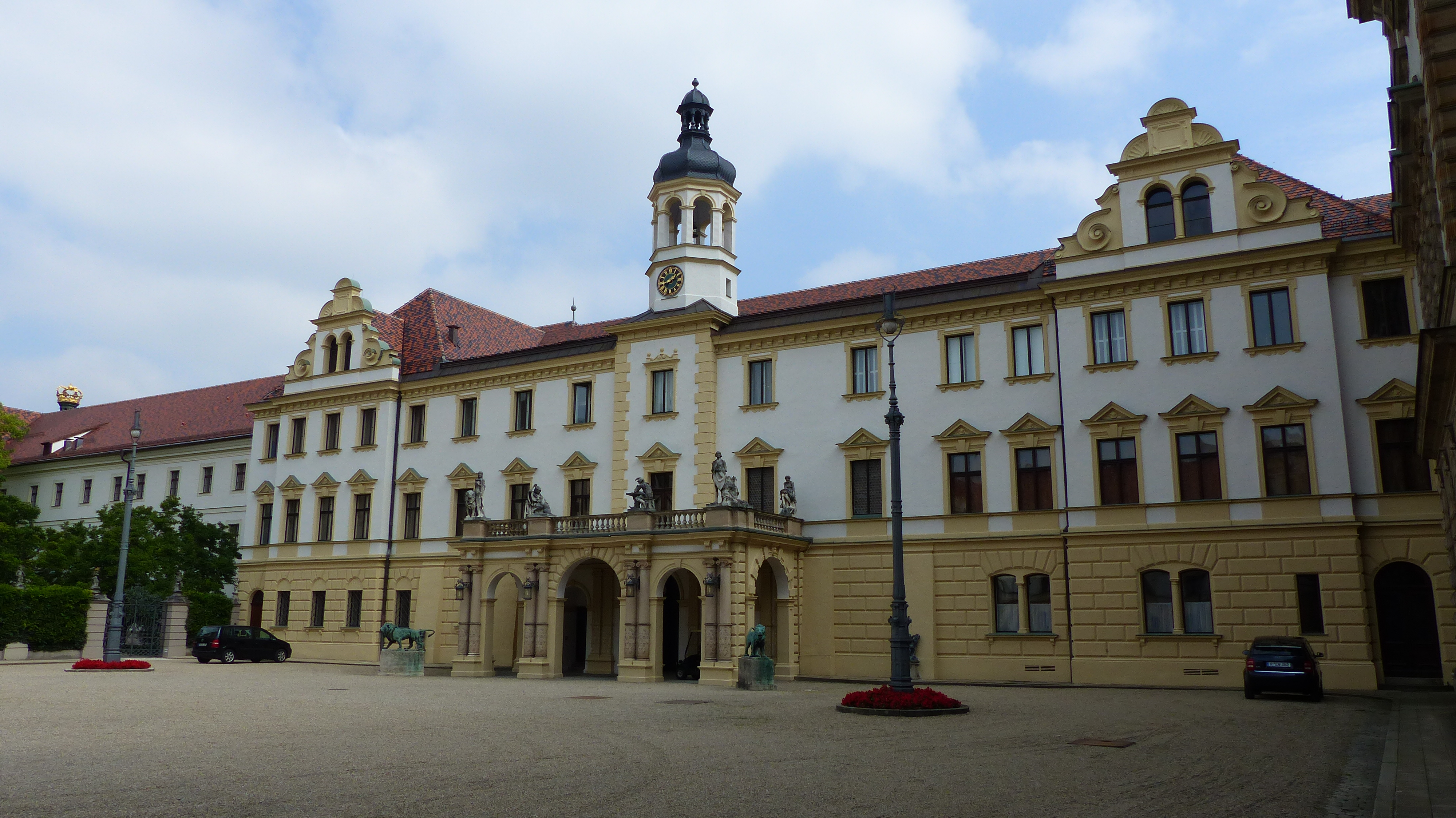 Schloss St. Emmeram von Thurn und Taxis in RegensburgThis is a photograph of an architectural monument.